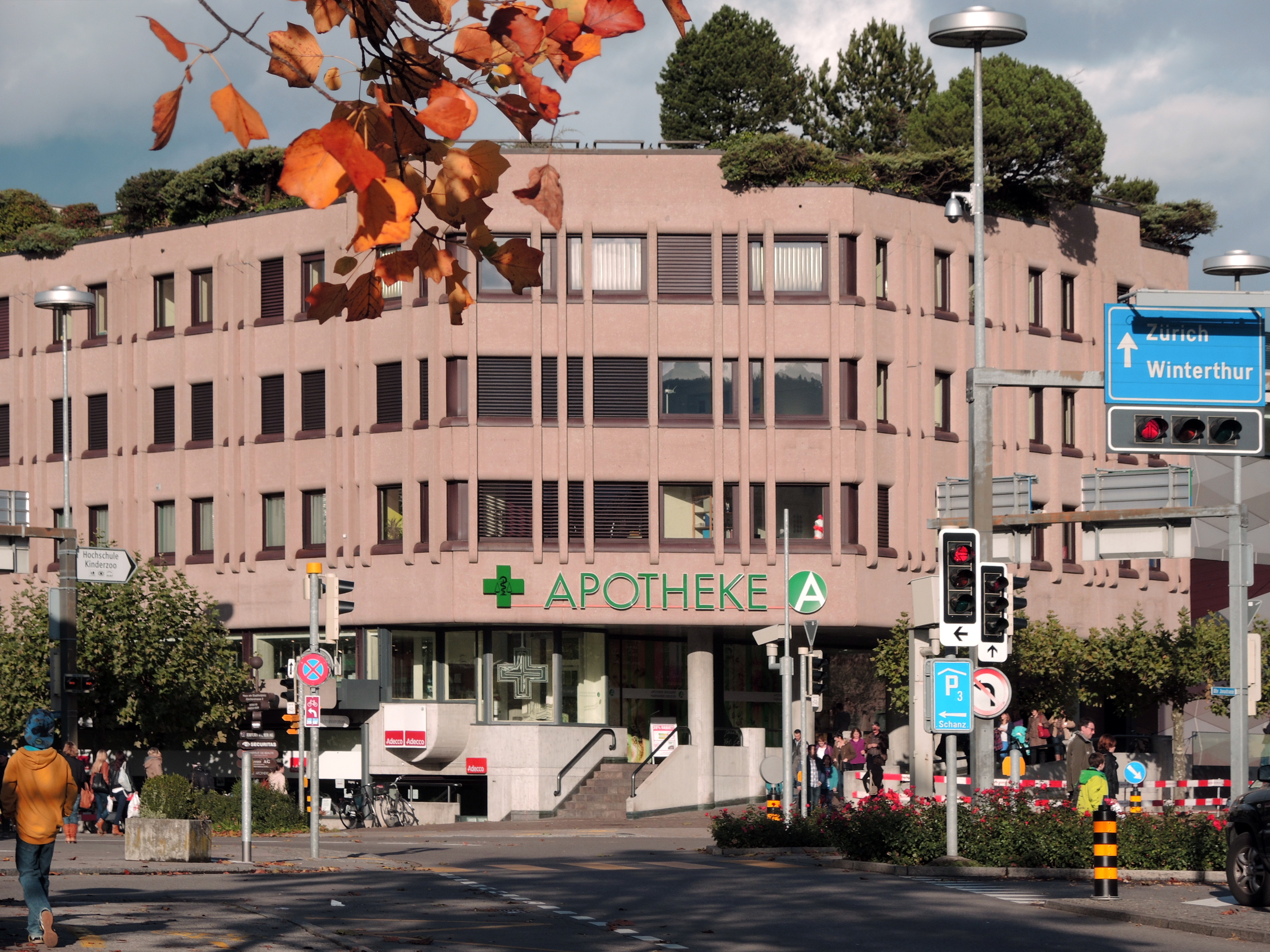 Sonnenhof in Rapperswil (Switzerland)